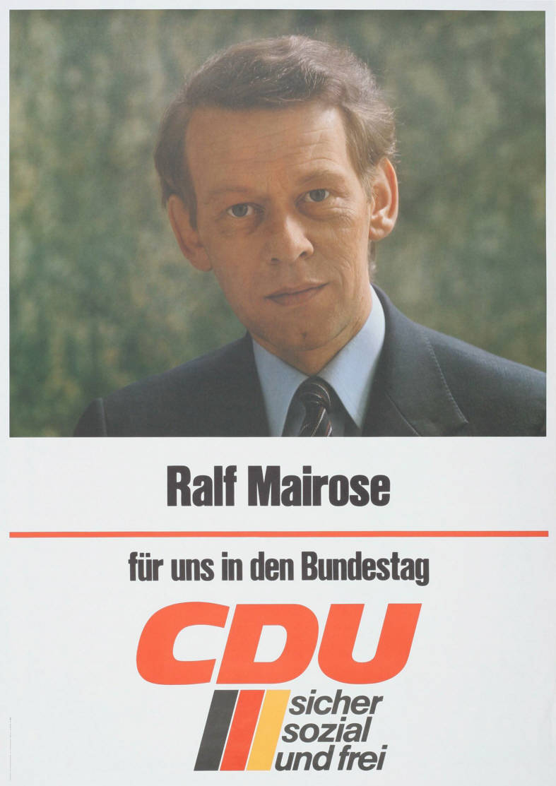 Ralf Mairose für uns in den Bundestag CDU sicher sozial und freiAbbildung:PorträtfotoPlakatart:Kandidaten-/Personenplakat mit PorträtAuftraggeber:CDU-Bundesgeschäftsstelle, Abt. Öffentlichkeitsarbeit, BonnObjekt-Signatur:10-001: 2574Bestand:Plakate zu Bundestagswahlen (10-001)GliederungBestand10-18:Plakate zu Bundestagswahlen (10-001) » Die 10. Bundestagswahl am 6. März 1983 » CDU » Mit PorträtfotoLizenz:KAS/ACDP 10-001: 2574 CC-BY-SA 3.0 DE